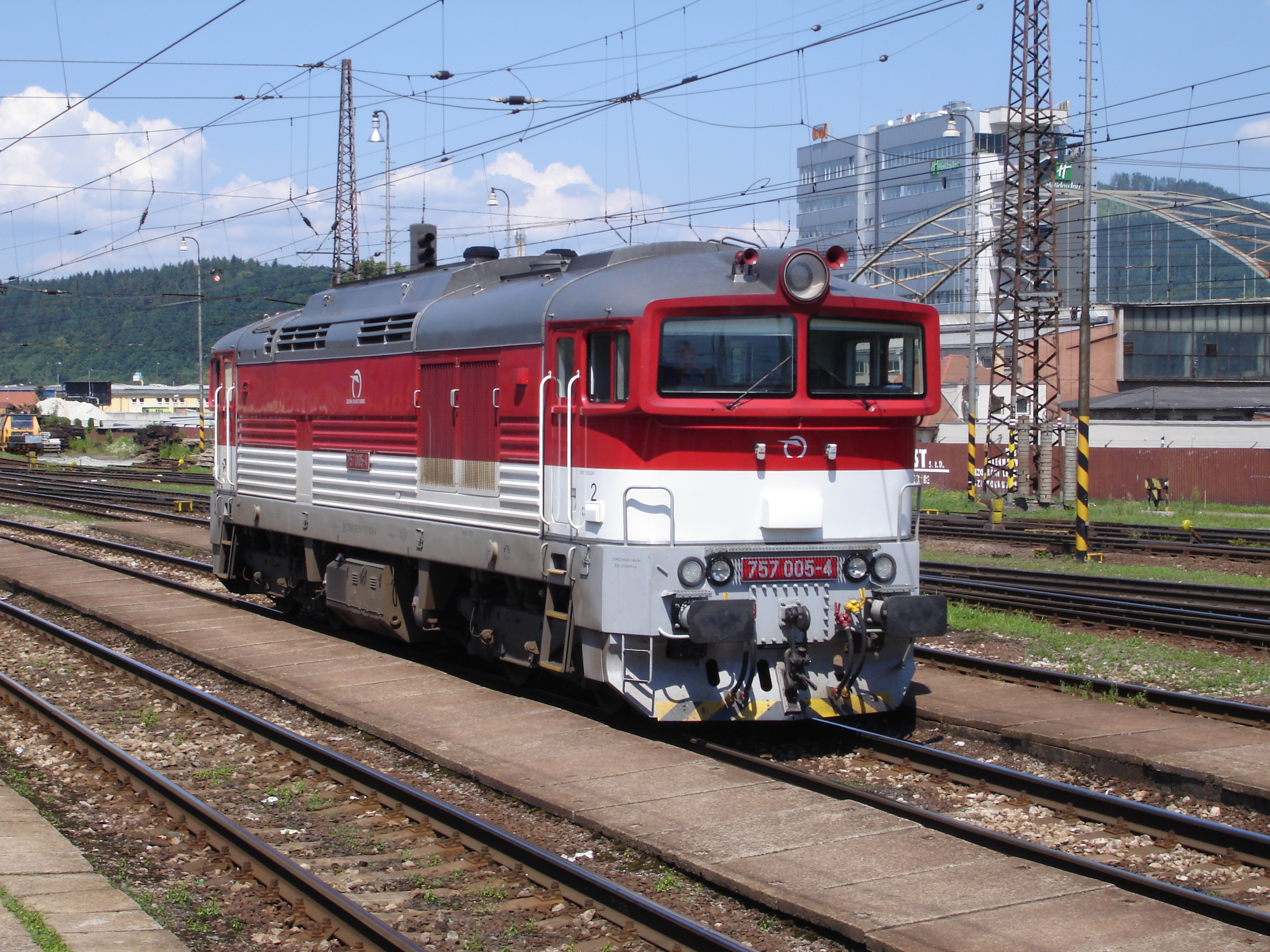 Diesellokomotive der ZSSK-Baureihe 757 im Bahnhof Žilina, Slowakei